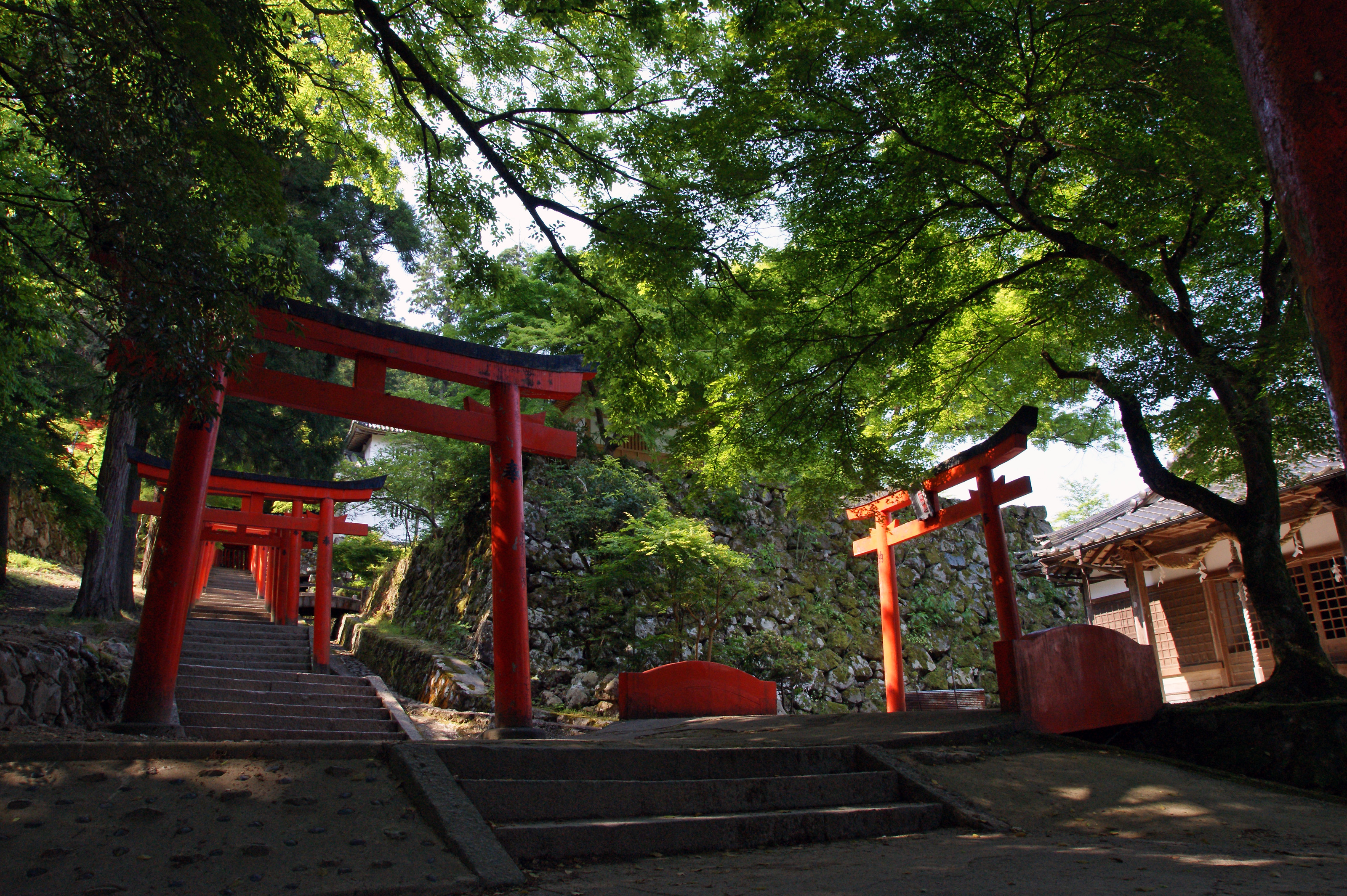 Arikoyama-inarijinja (Izushi Castle) in Toyooka, Hyogo prefecture, Japan